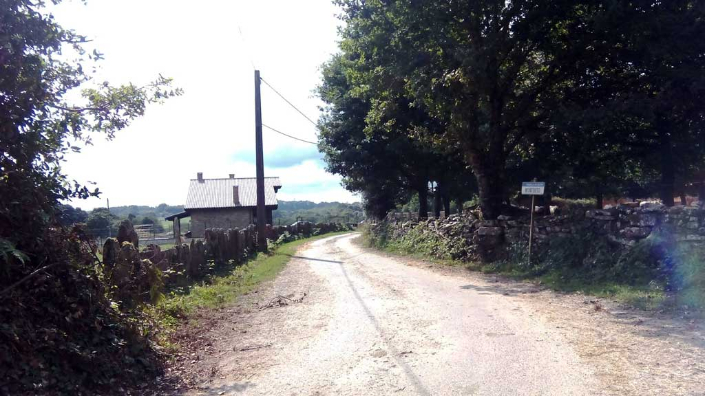 Vista de Montouto, Curtis.